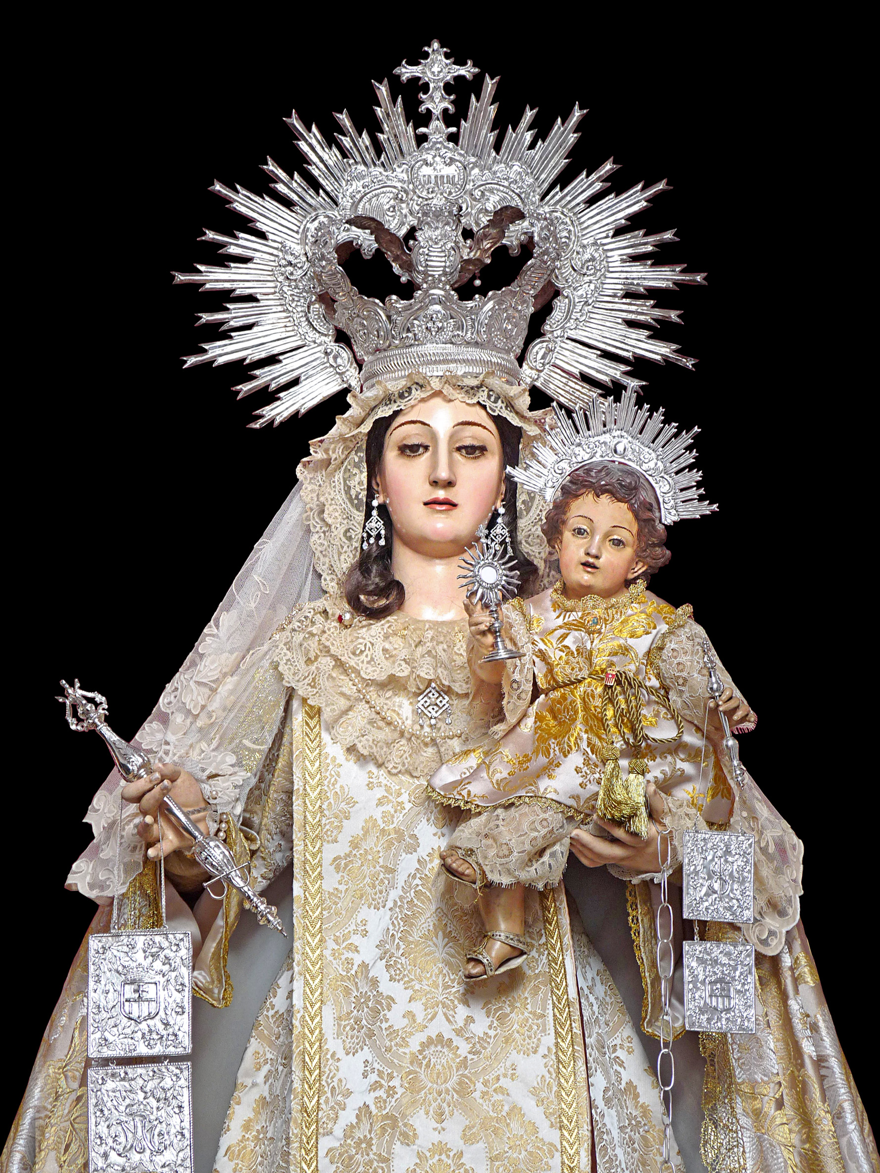 Imagen de Ntra. Sra. de las Mercedes. San Fernando (Cádiz)andre